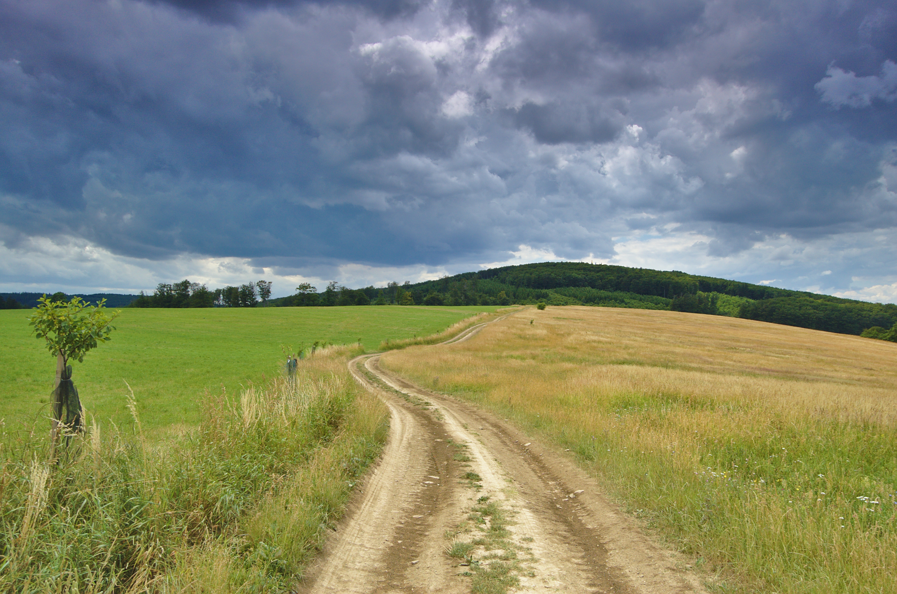 Pohled na Hradisko od východu, Nová Lhota, okres Hodonín